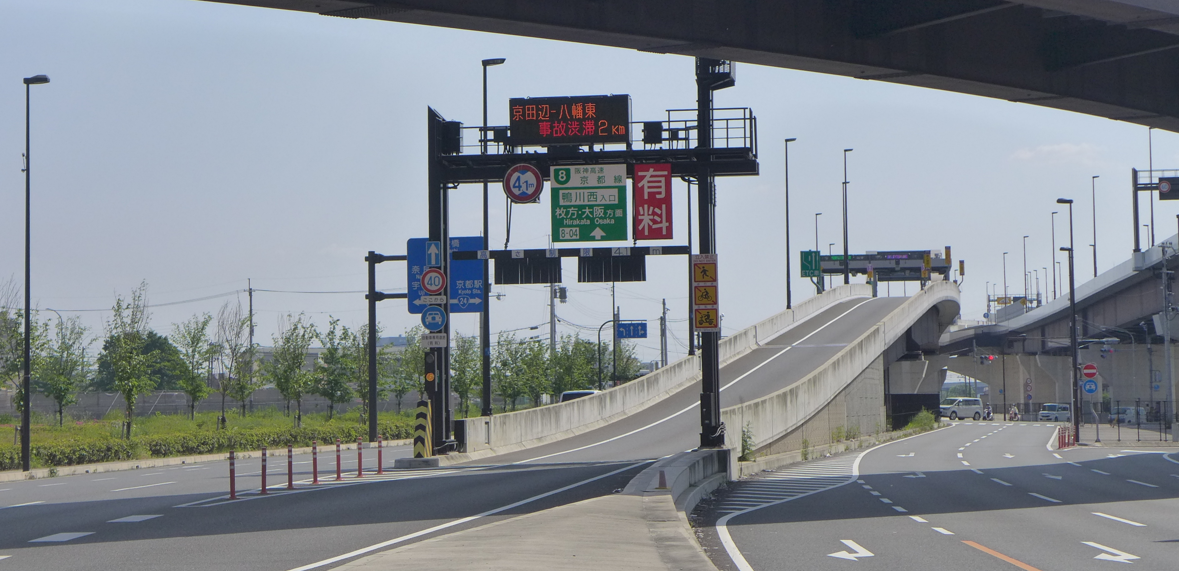 鴨川西大阪方面入口。2011年の画像（